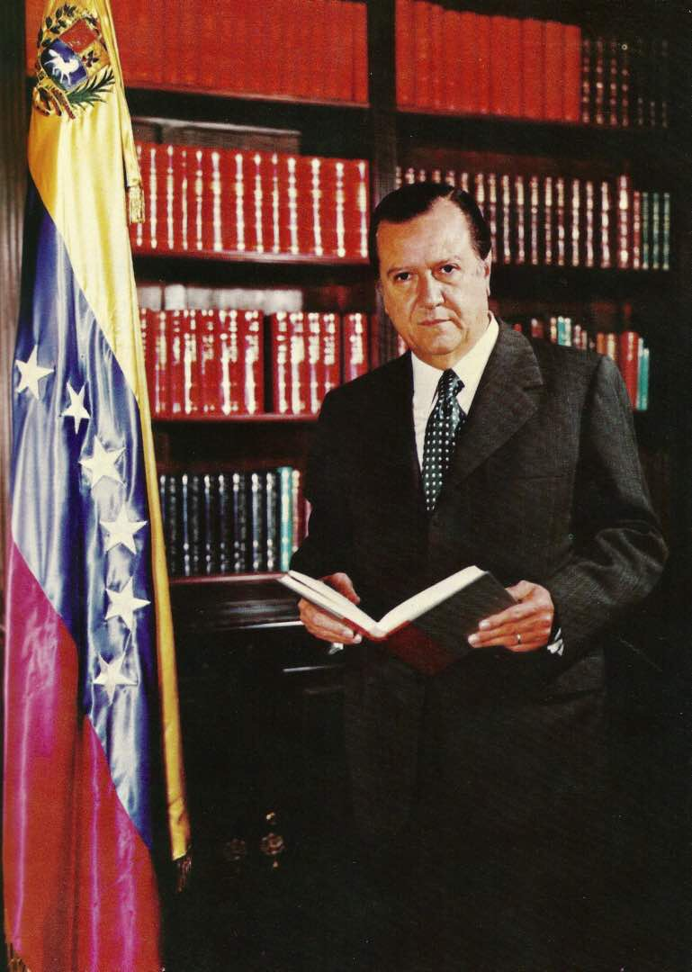 Retrato del Presidente de Venezuela, Rafael Caldera, en la biblioteca de la residencia oficial, La Casona.